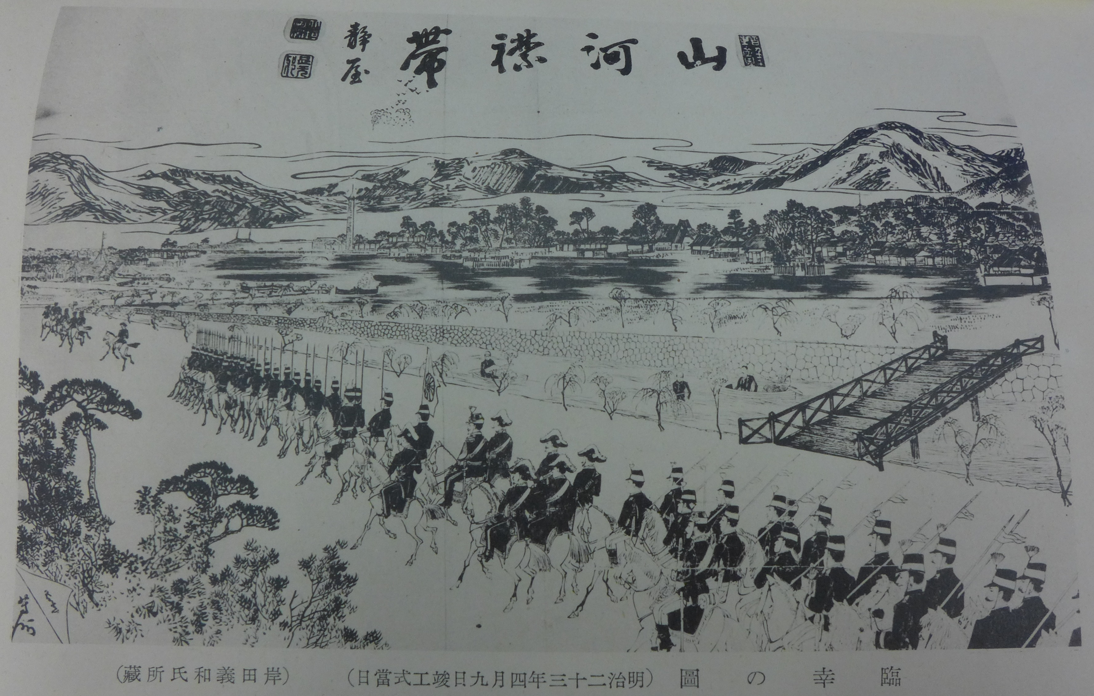 「明治23年4月9日竣工日当日。岸田義和氏所蔵」と記載。明治天皇・皇后両陛下の御臨幸を仰ぎ竣工式を挙行